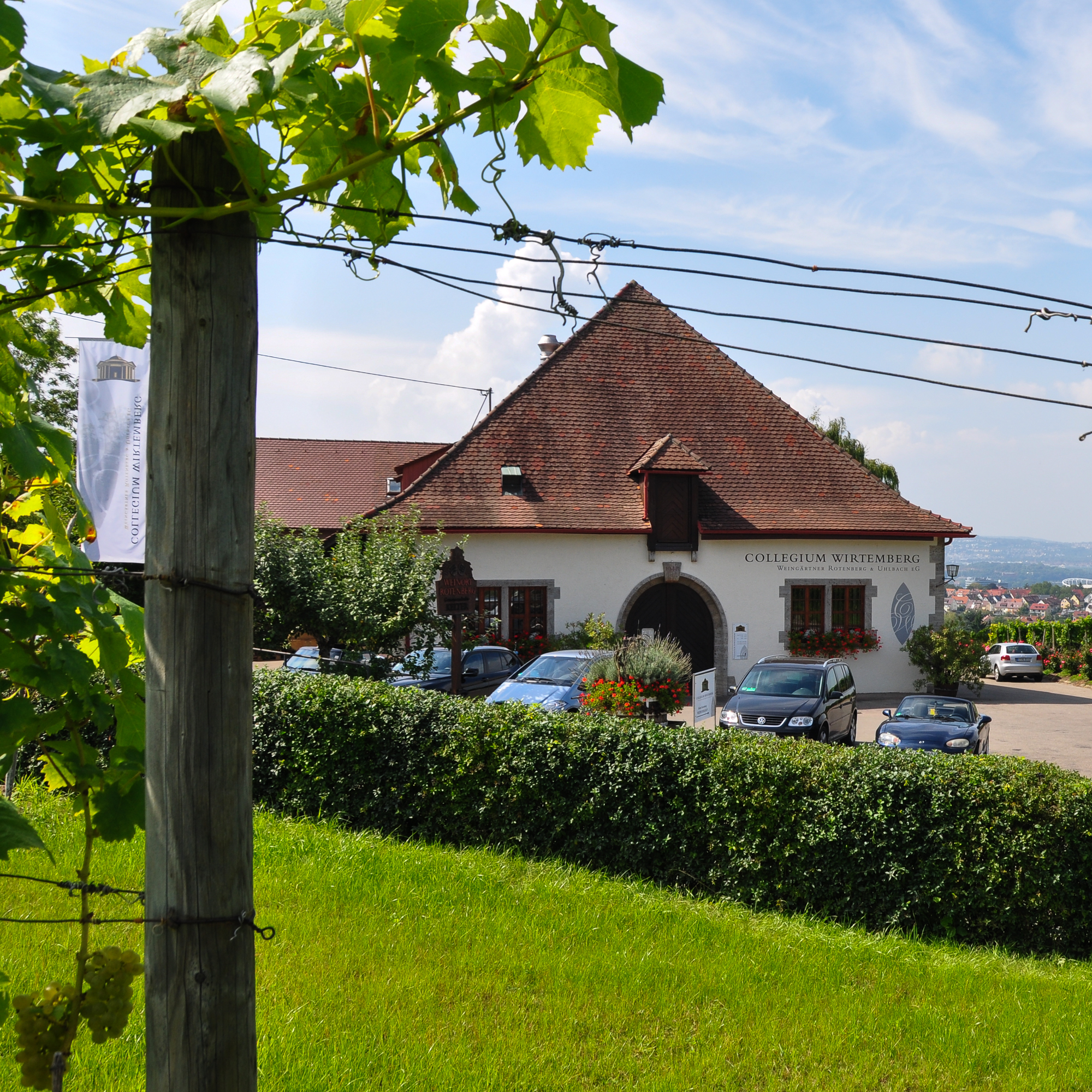 Kelter